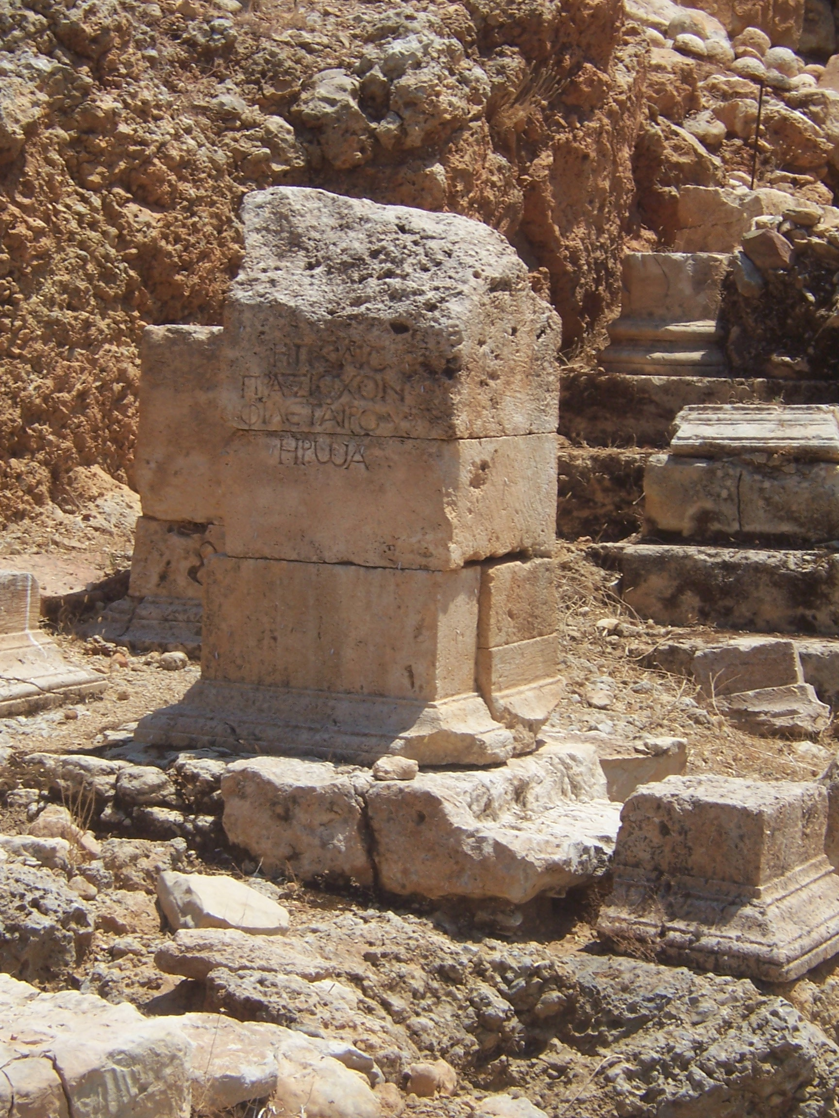 Heroon, Aptera, Crète